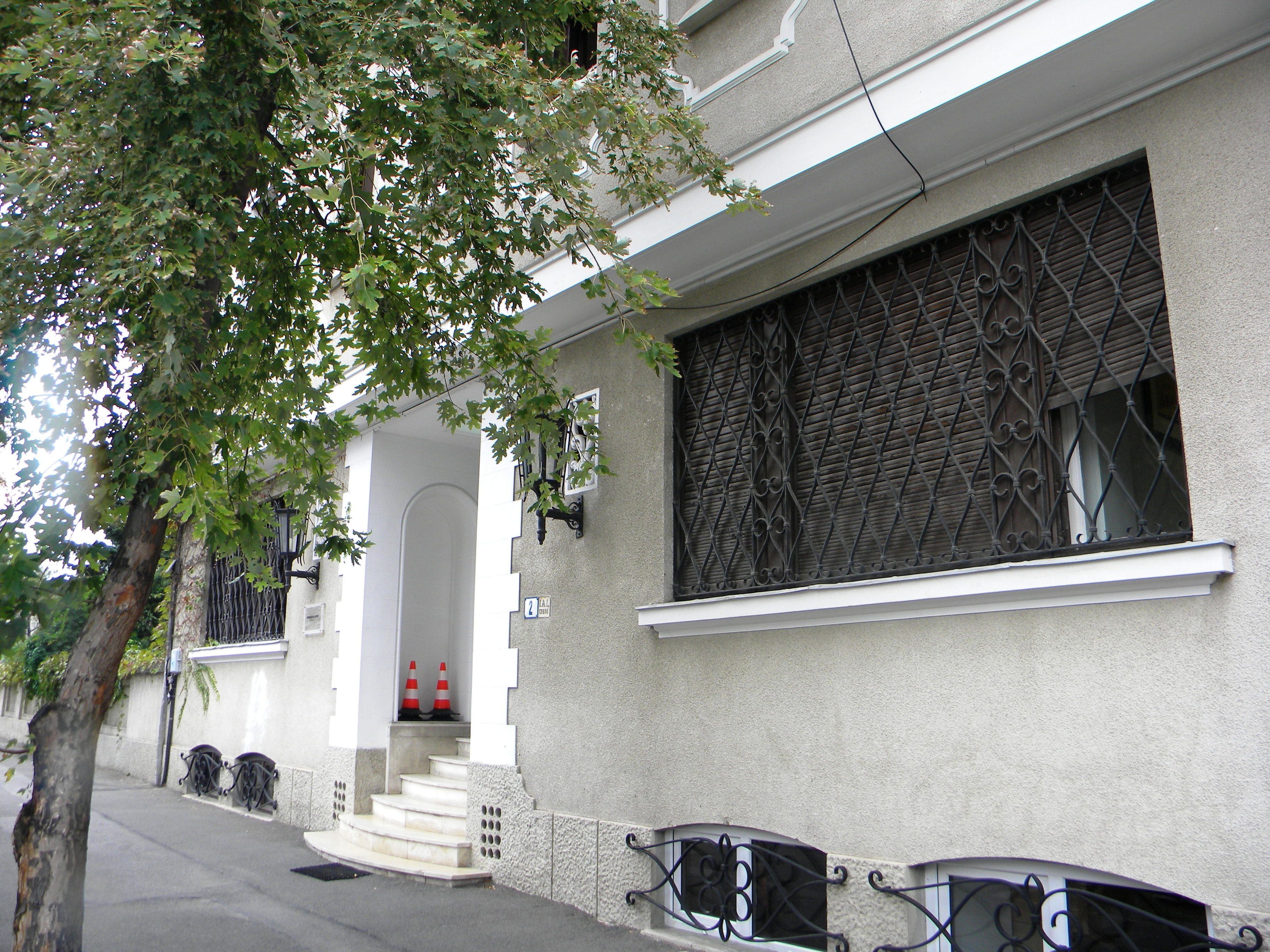 Bucuresti, Romania, Casa pe Str. Emil Pangratti nr. 2, sect. 1 (detaliu 4)